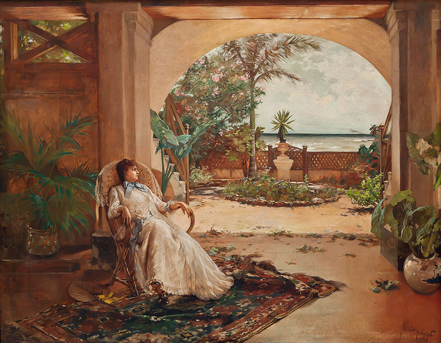 Guillermo Collazo. La Siesta, 1888. Museo Nacional de Bellas Artes de Havana, Cuba.